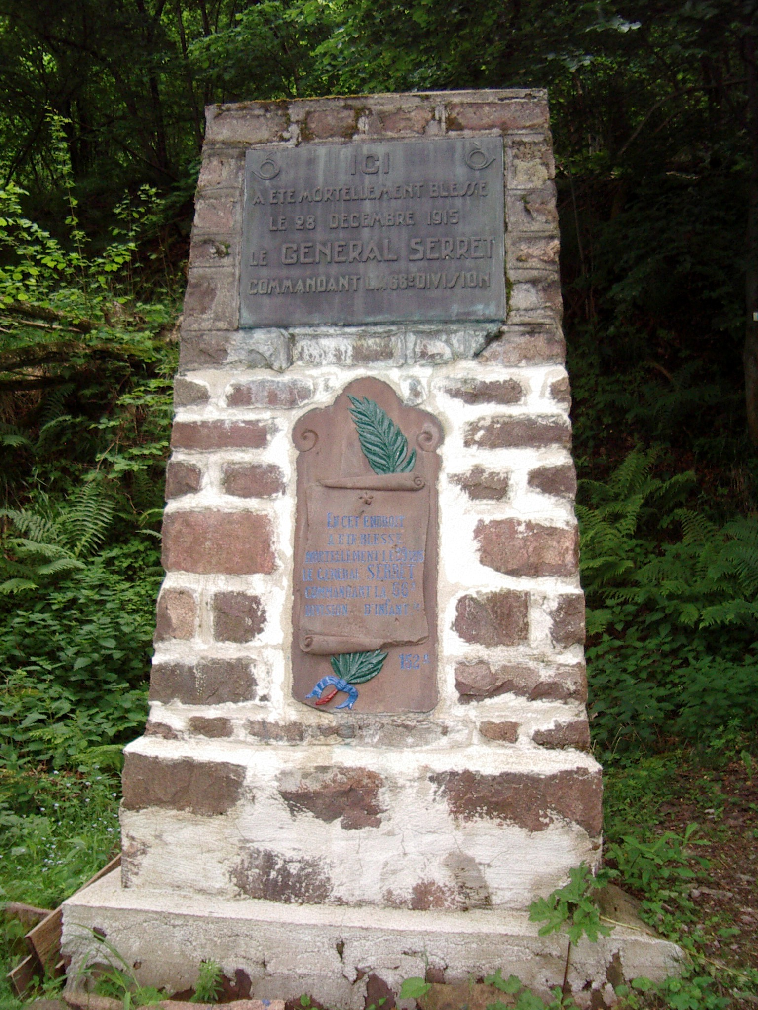 Monument Serret, Hartmannswillerkopf, Haut-Rhin, France